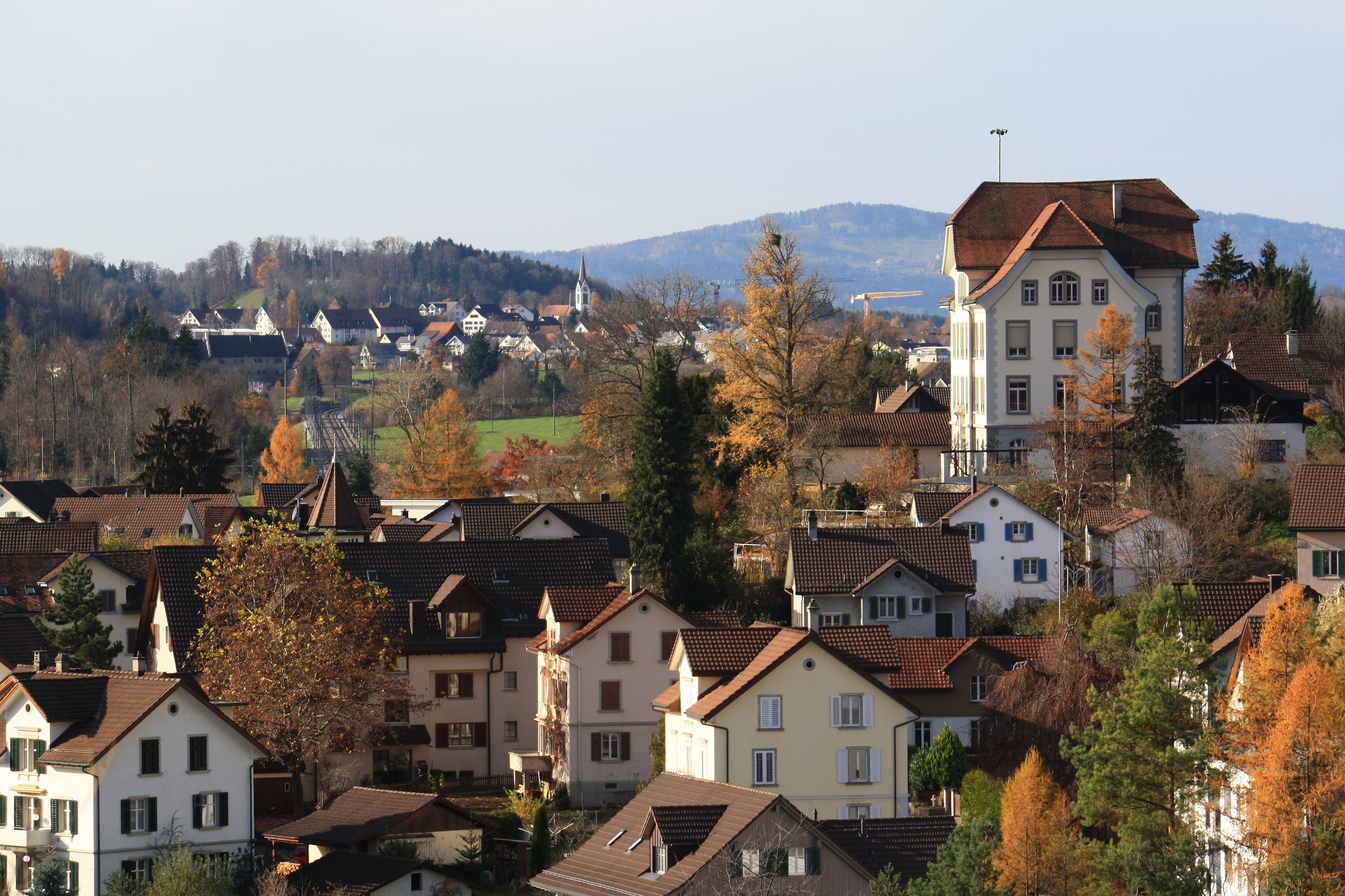 Tann-Rüti, as seen from Haltberg in Rüti (ZH), Dürnten and Pfannenstiel in the background.